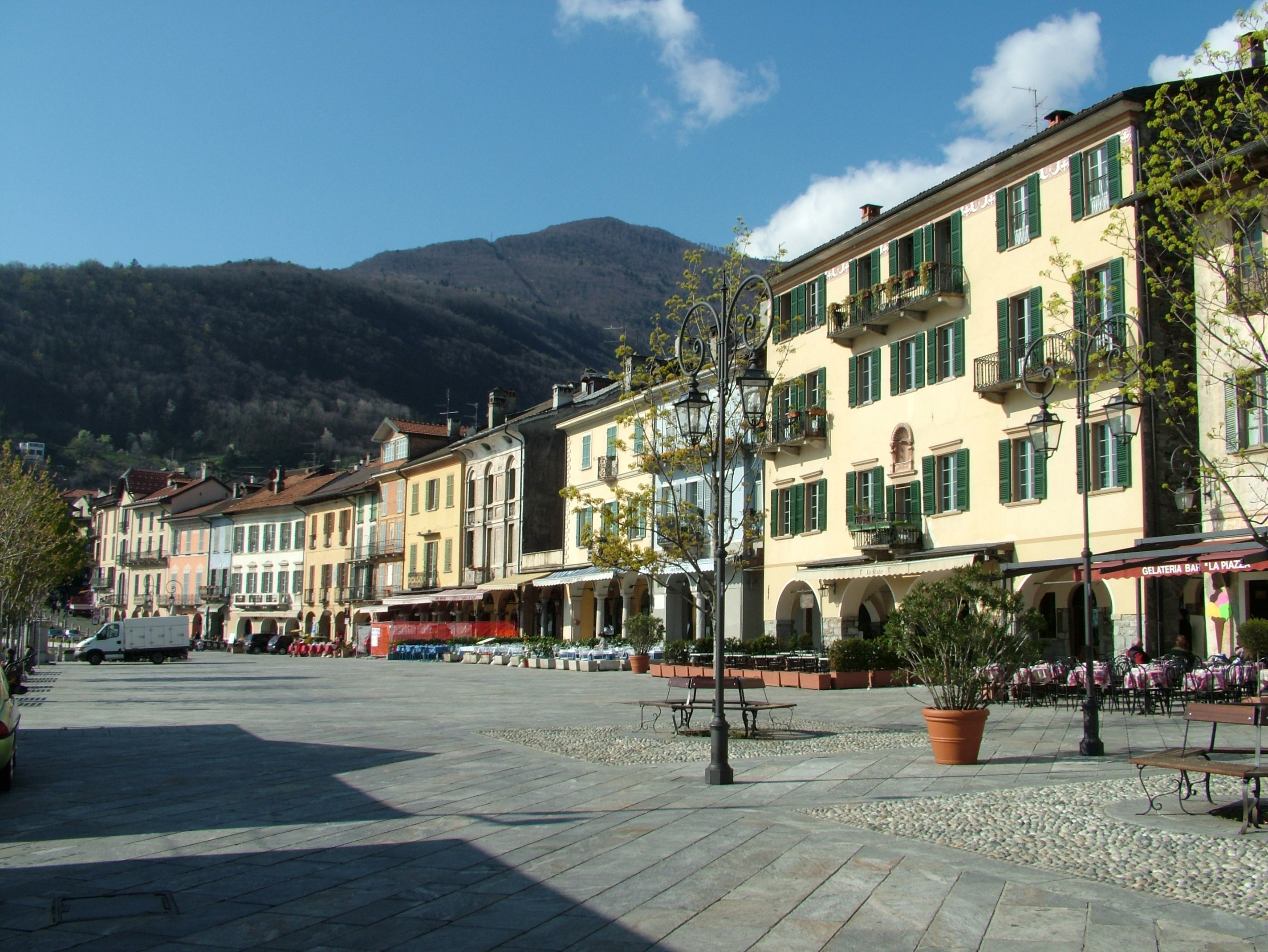 Cannobio, Italien, Region Piemont, die Uferpromenade